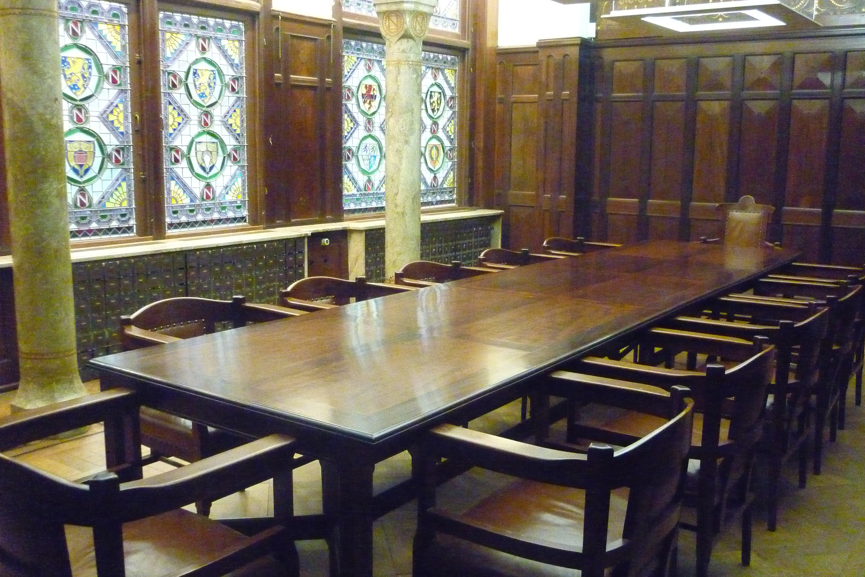 Vergaderzaal in voormalig kantoor van de Nationale Nederlanden aan het Kerkplein in Den Haag, ontwerp Berlage